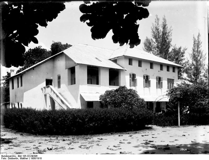 Haus am Bagamojo, Enim-Pascha-Haus